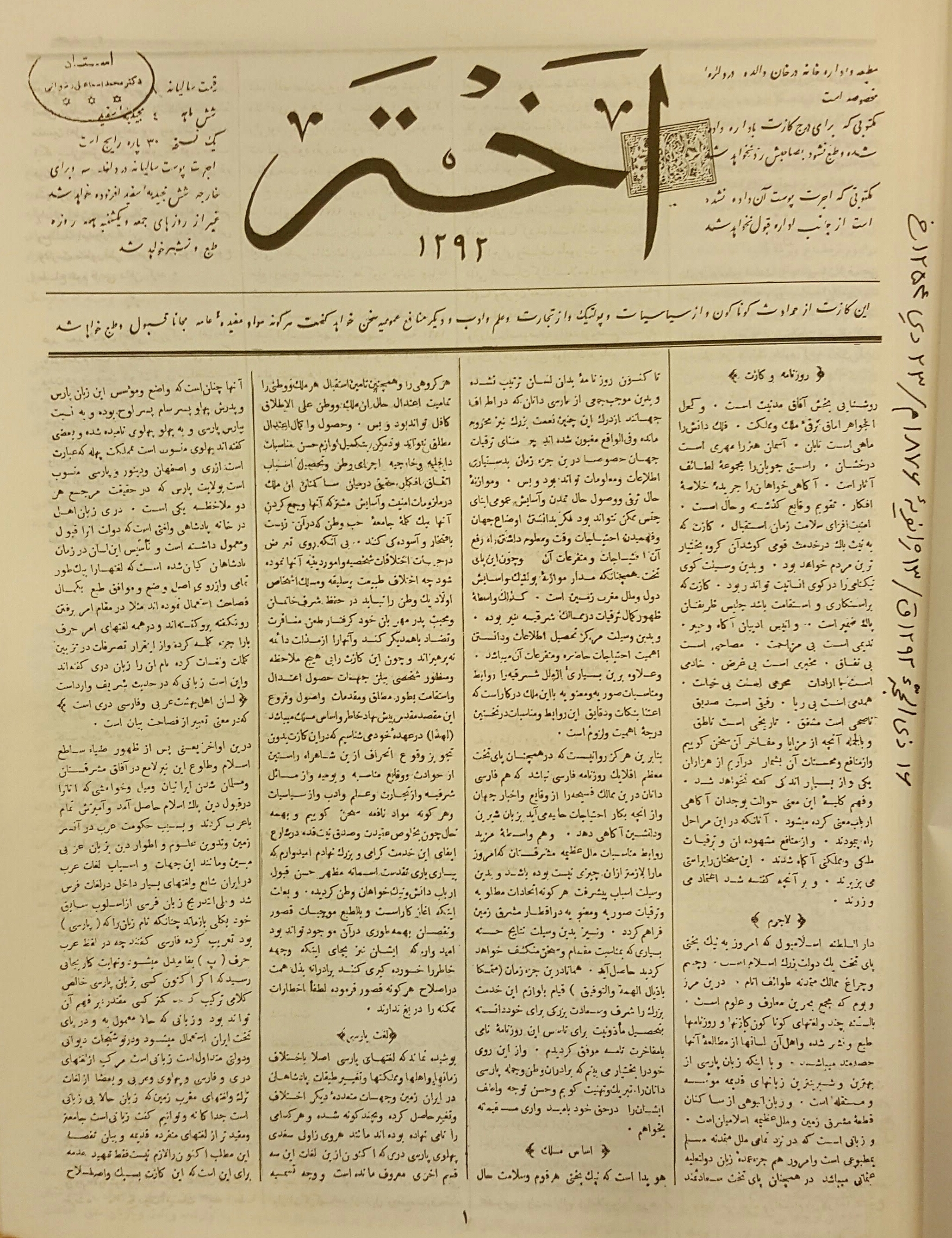 شمارهٔ اولِ روزنامهٔ اختر، صفحهٔ یک